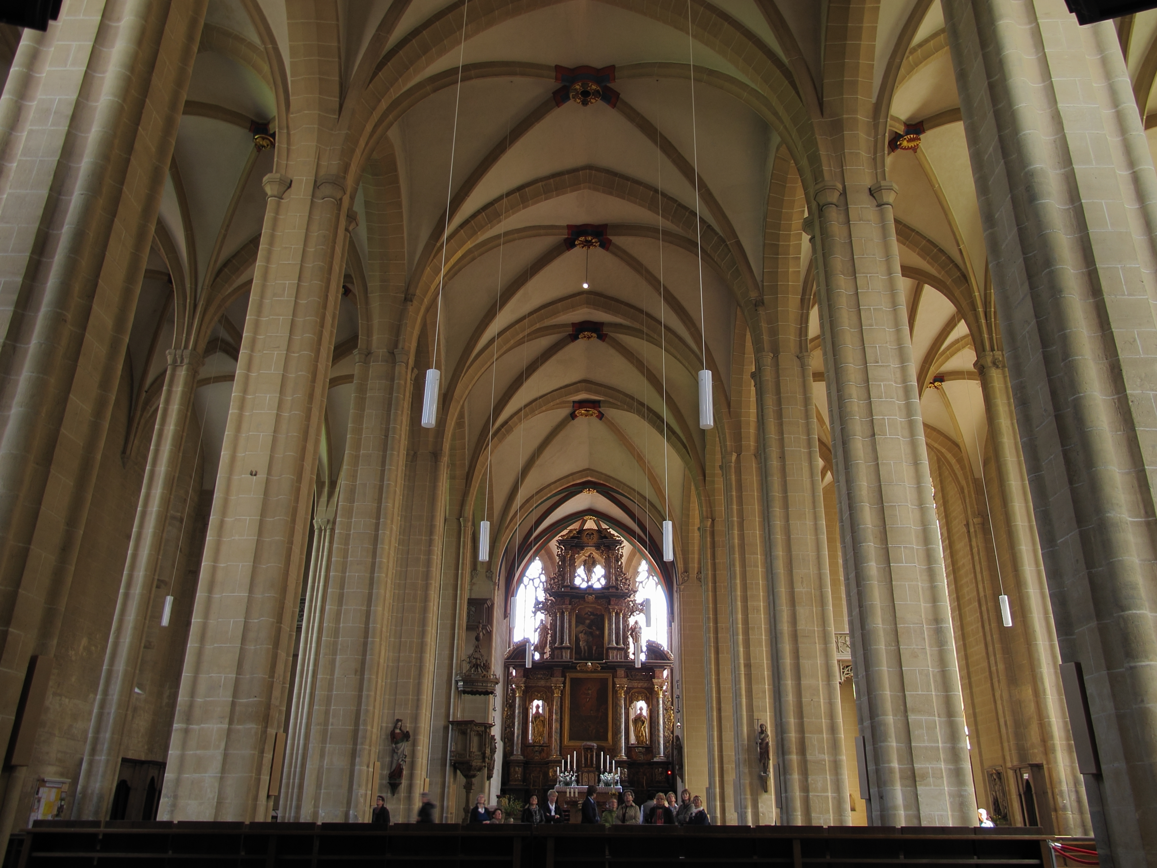 Erfurt, Kirche St. Severi, Innenansicht Richtung Altar